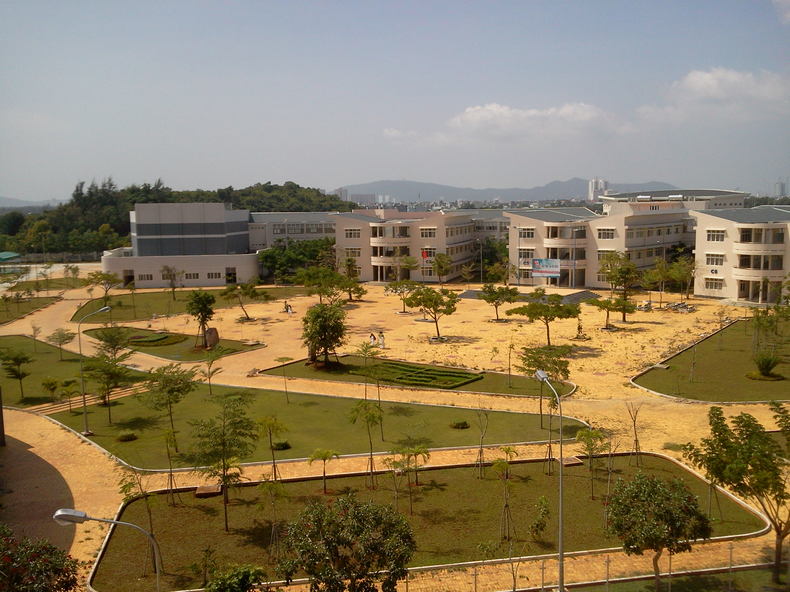 Khuôn viên trường THPT Chuyên Lê Quý Đôn thành phố Vũng Tàu